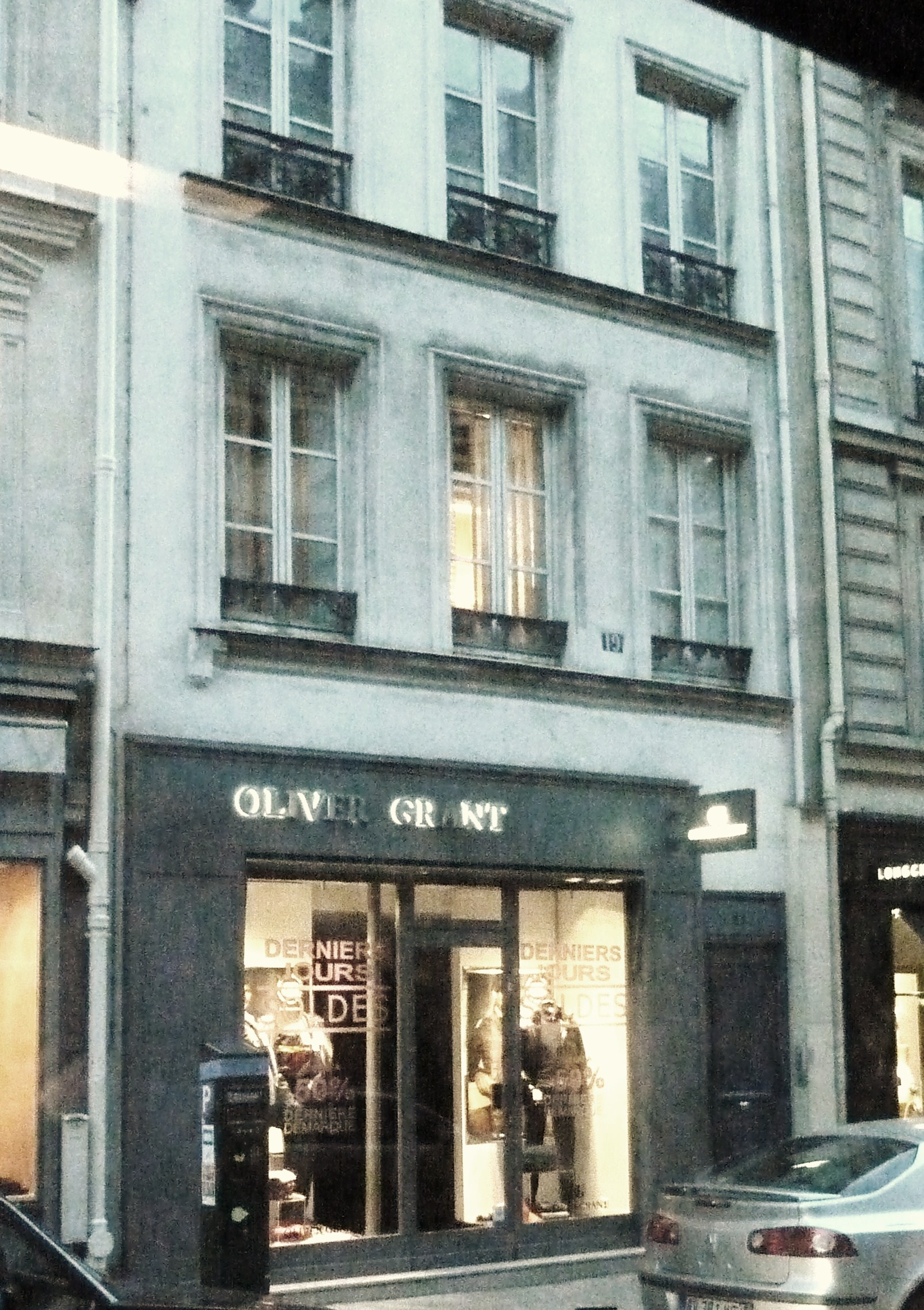 Bâtiment de l'ancien Hôtel du Vieux-Colombier, rue du Vieux-Colombier (Paris), dirigé dans les années 1950 par les peintres français Louis Nallard et Maria Manton et fréquenté par de nombreux peintres, écrivains, musiciens.